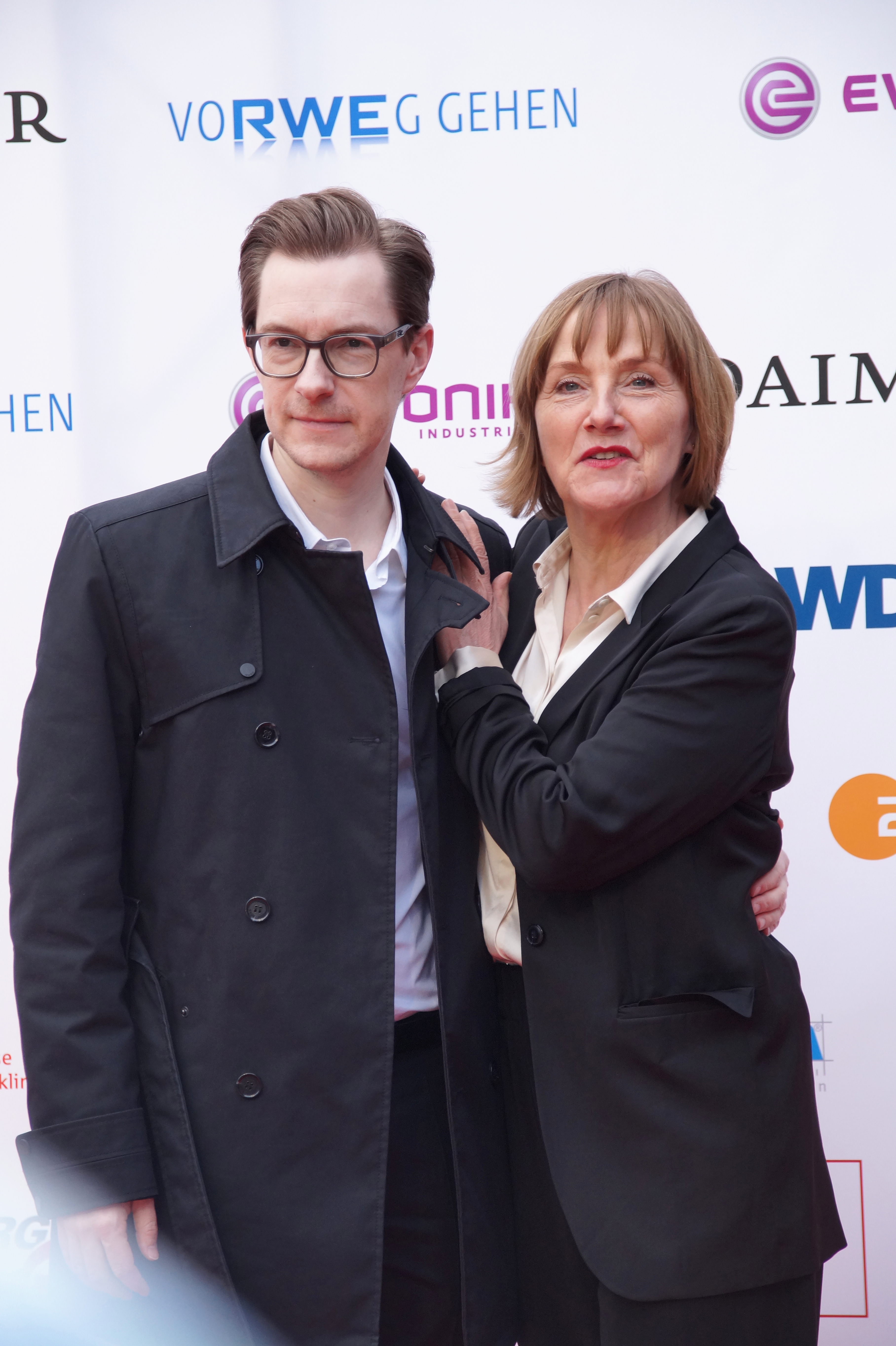 Marc Müller-Kaldenberg, Ruth Reinecke bei der Verleihung des 'Grimme Preis 2016' am 08.04.2016 in Marl.